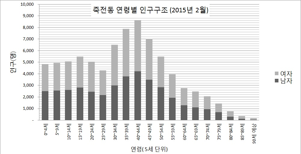 조선말: 경기도 용인시 죽전동 연령별 인구구조(2015년 2월 기준)